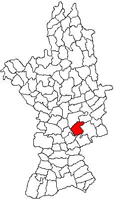 Categorie:Hărţi ale judeţului Olt